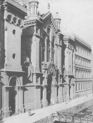 Riera d'en Malla al carrer casp